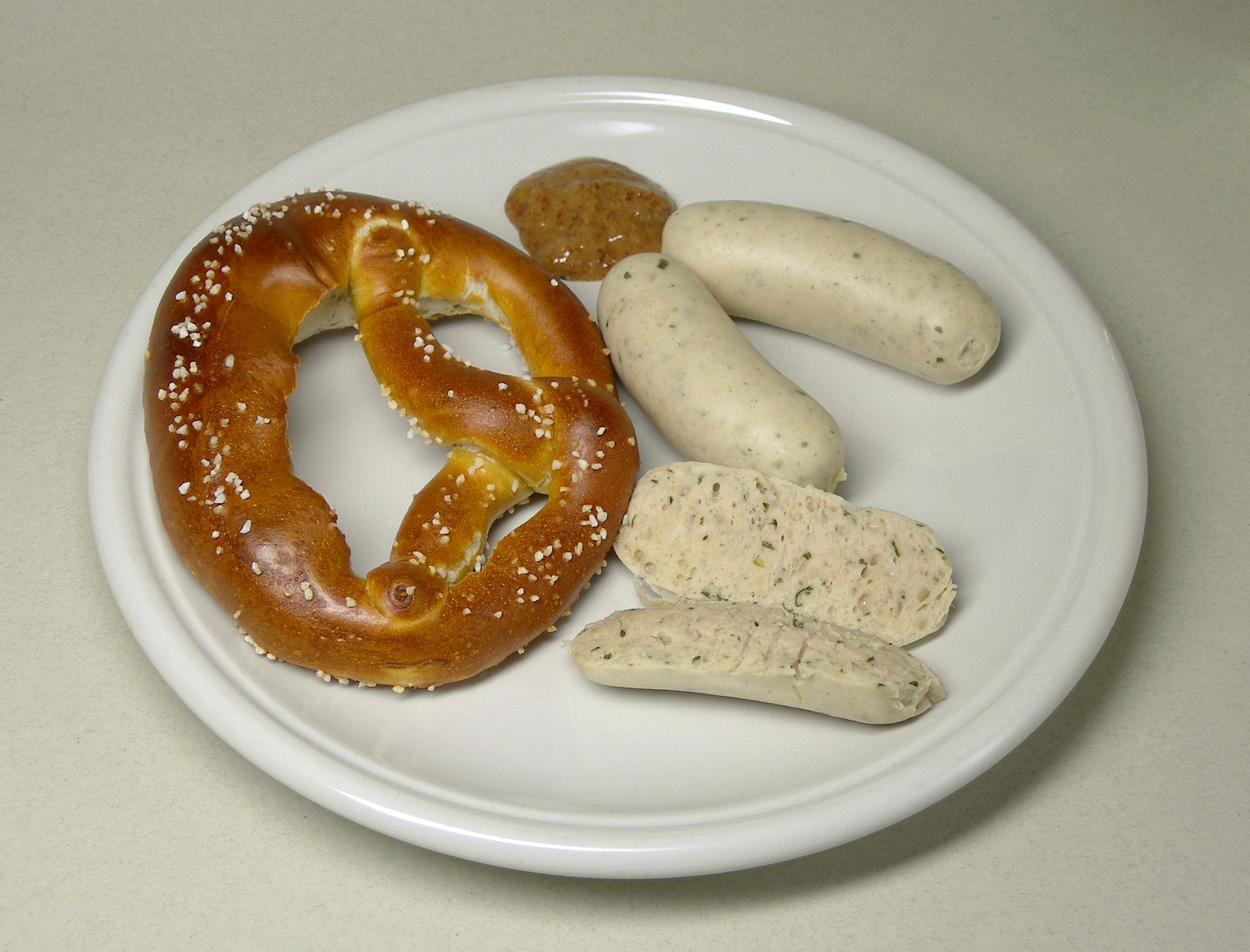 Münchner Weißwurst, a bavarian sausage